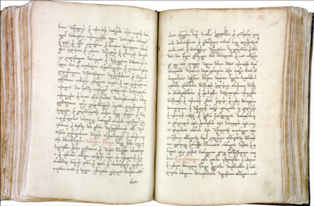 მარიამისეული ქართლის ცხოვრება